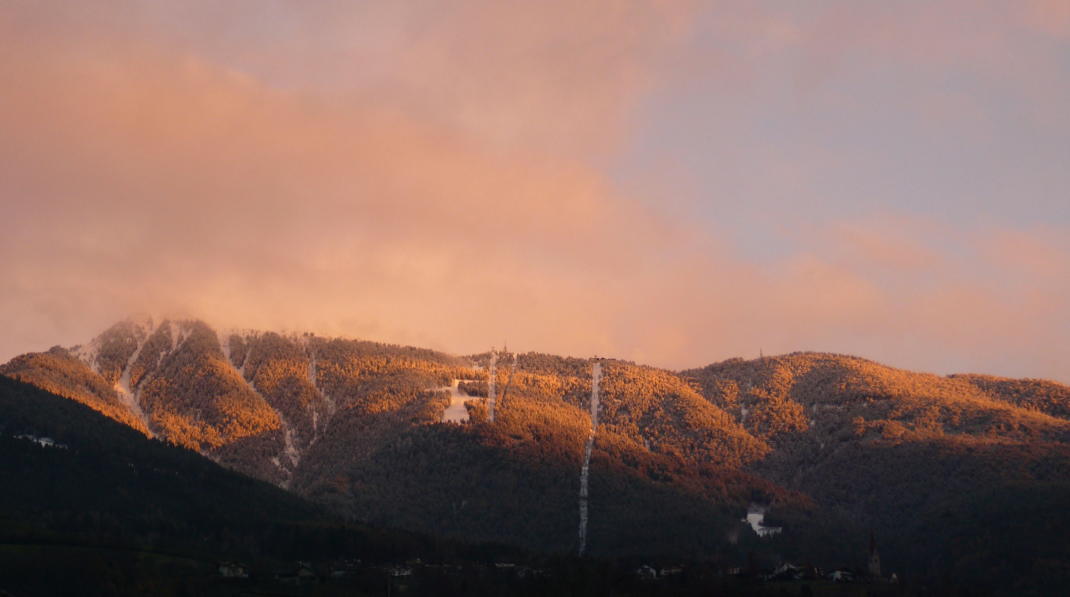 Plose innevata